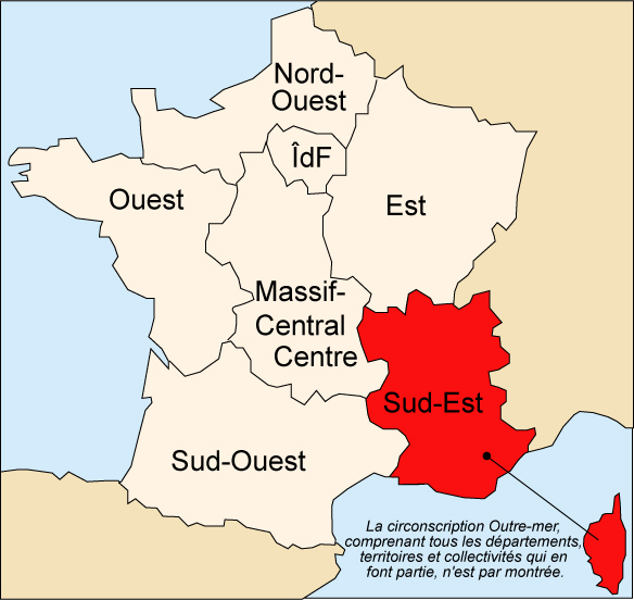 Les circonscriptions en France pour les élections européennes